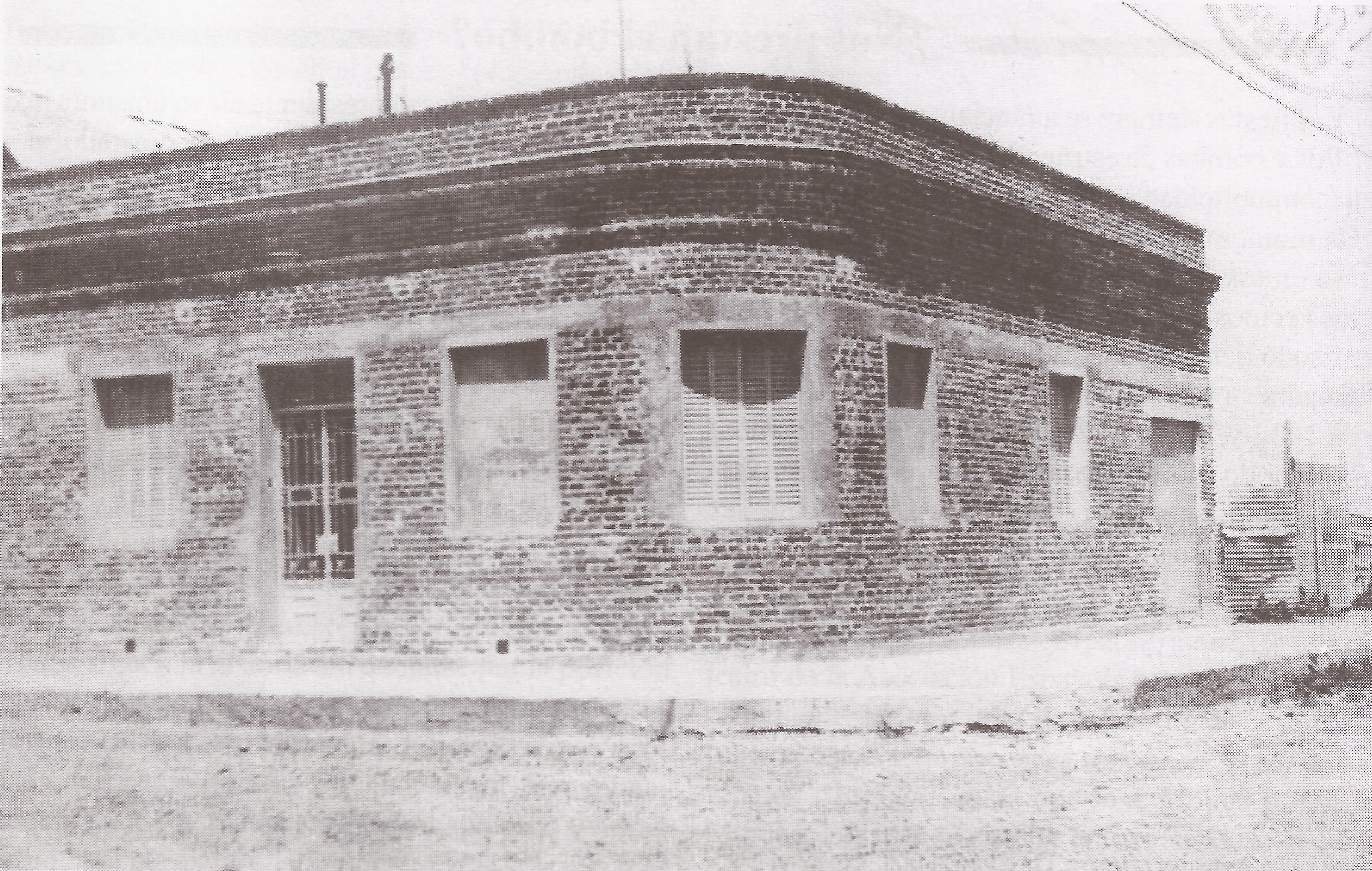 Primitiva estación de radio de Comodoro Rivadavia, Chubut, Patagonia, Argentina.